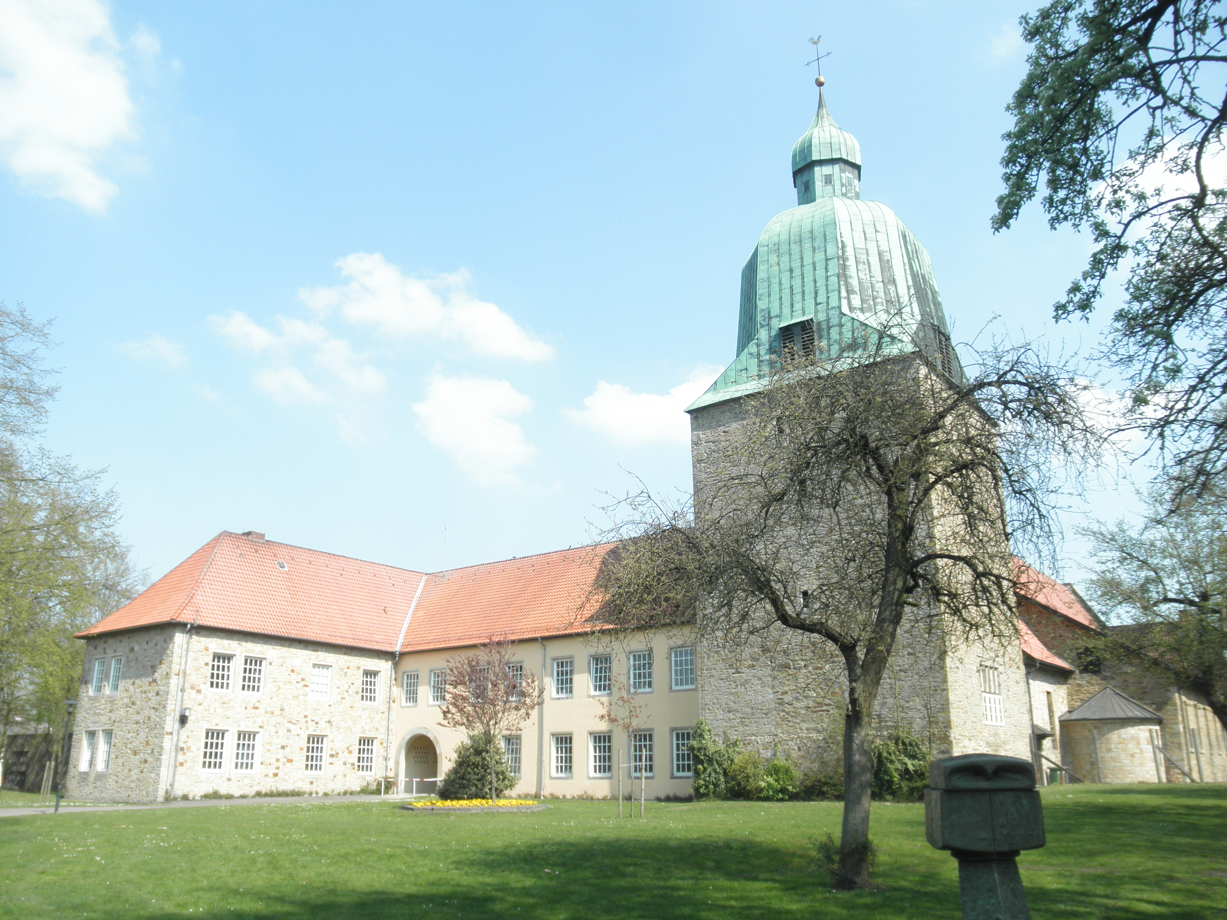 Kastelo Fürstenau